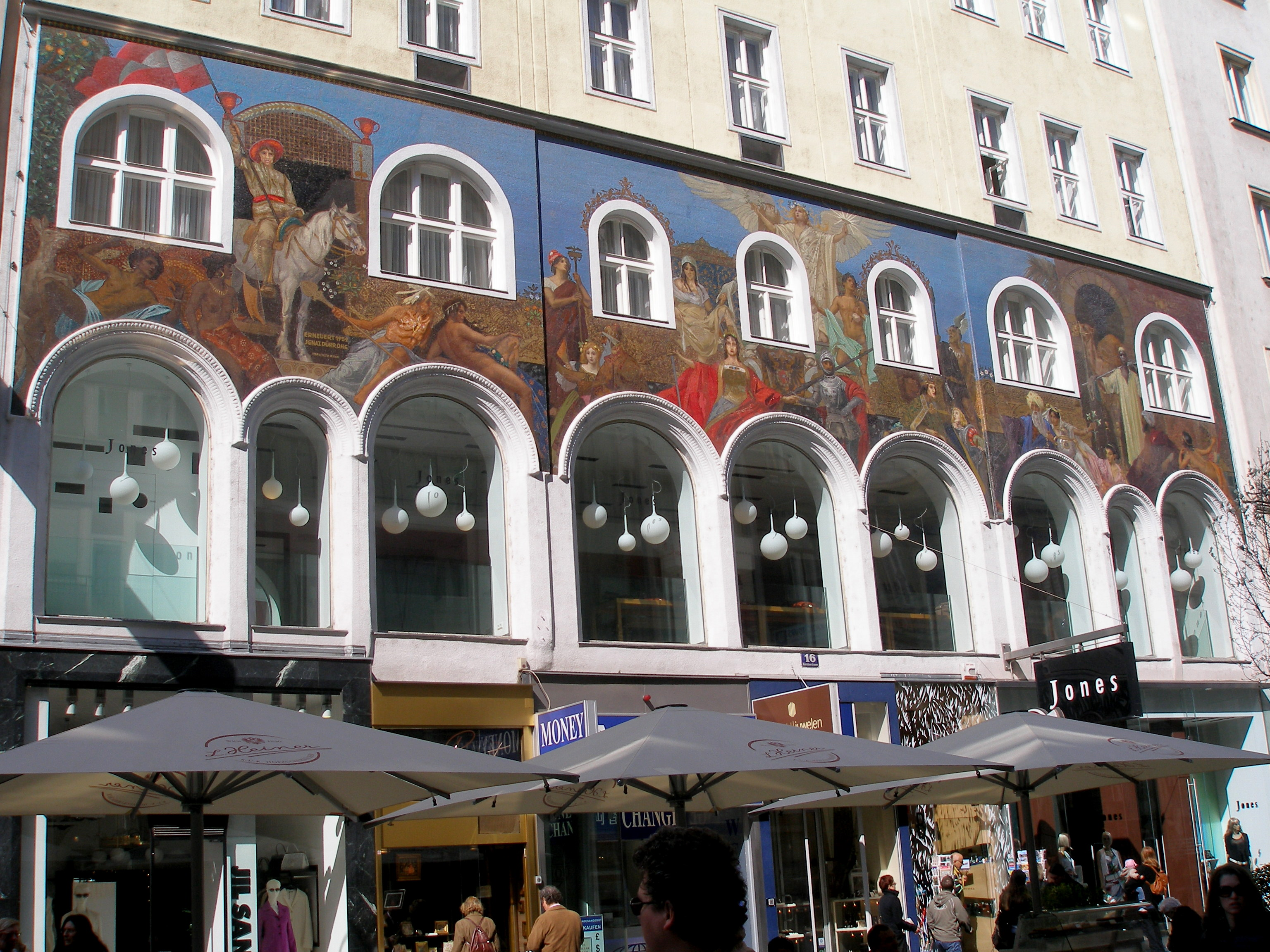 Viedeň obchodná trieda Kärntnerstrasse 16